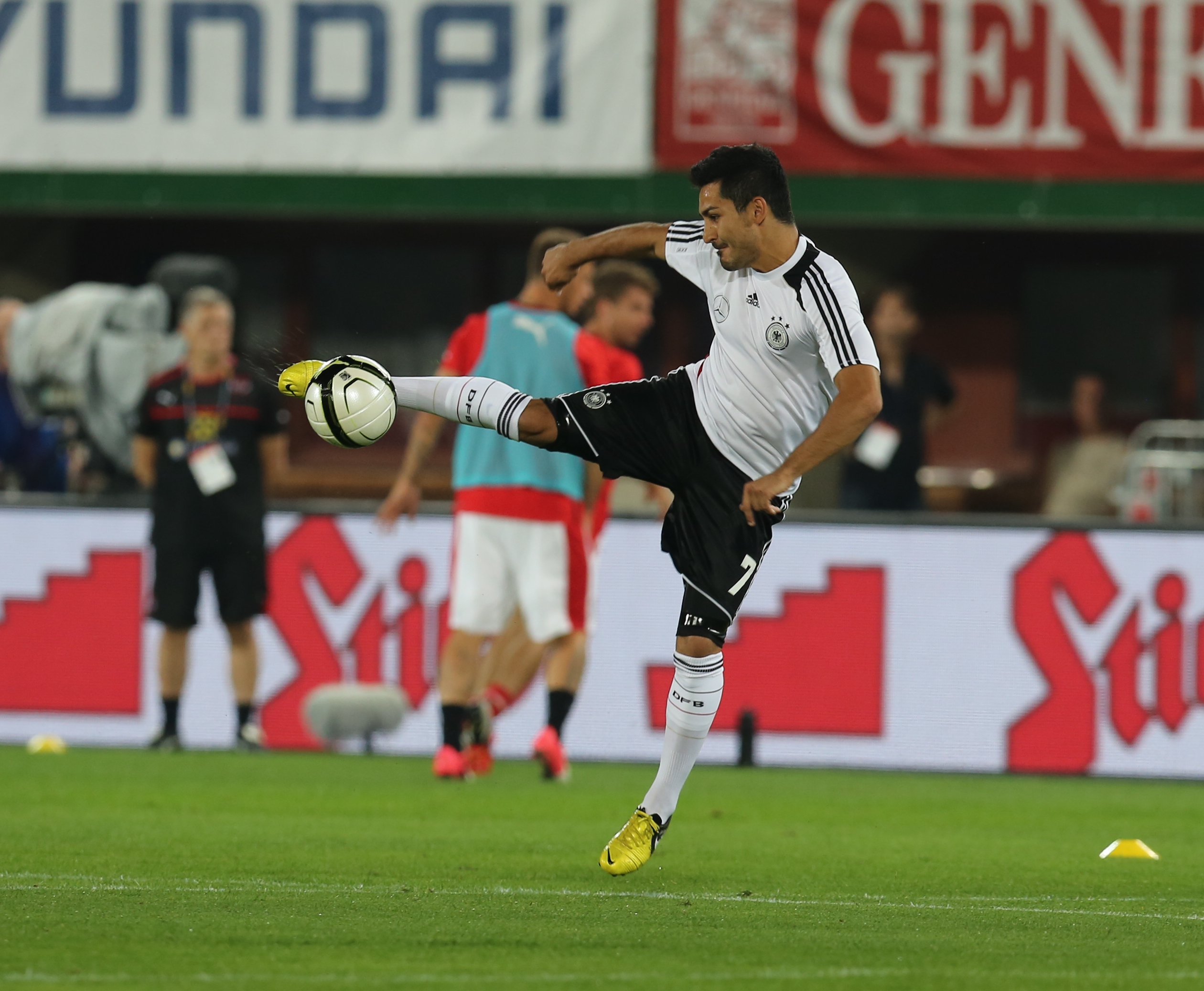 Fußball-Weltmeisterschaft 2014/Qualifikation (UEFA), Gruppe C, 11. September 2012, Österreich gegen Deutschland im Wiener Ernst-Happel-Stadion. The making of this work was supported by Wikimedia Austria. For other files made with the support of Wikimedia Austria, please see the category Supported by Wikimedia Österreich.